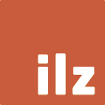 Logo